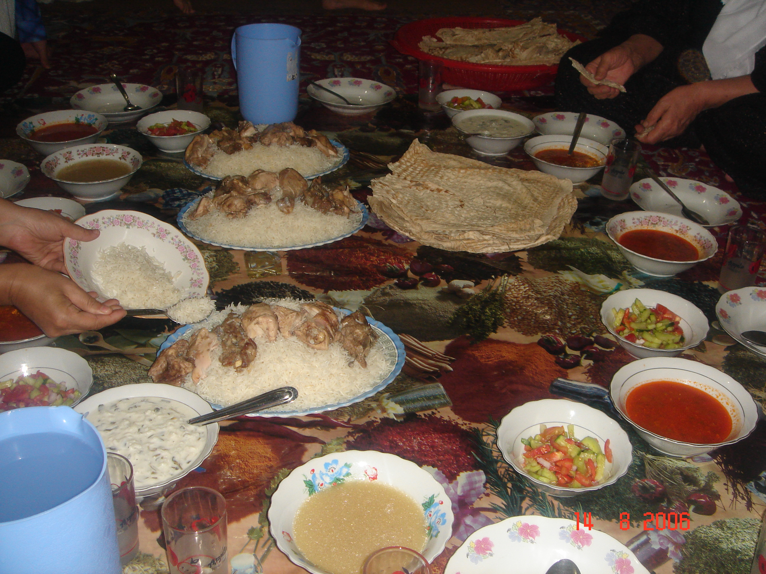 Dinner, Zinwe Kurdistan Koya Sargaloo Sulaimanyah Zinwe Hewler Iraq Dukan Bekhal Arbil Irbil Hawler